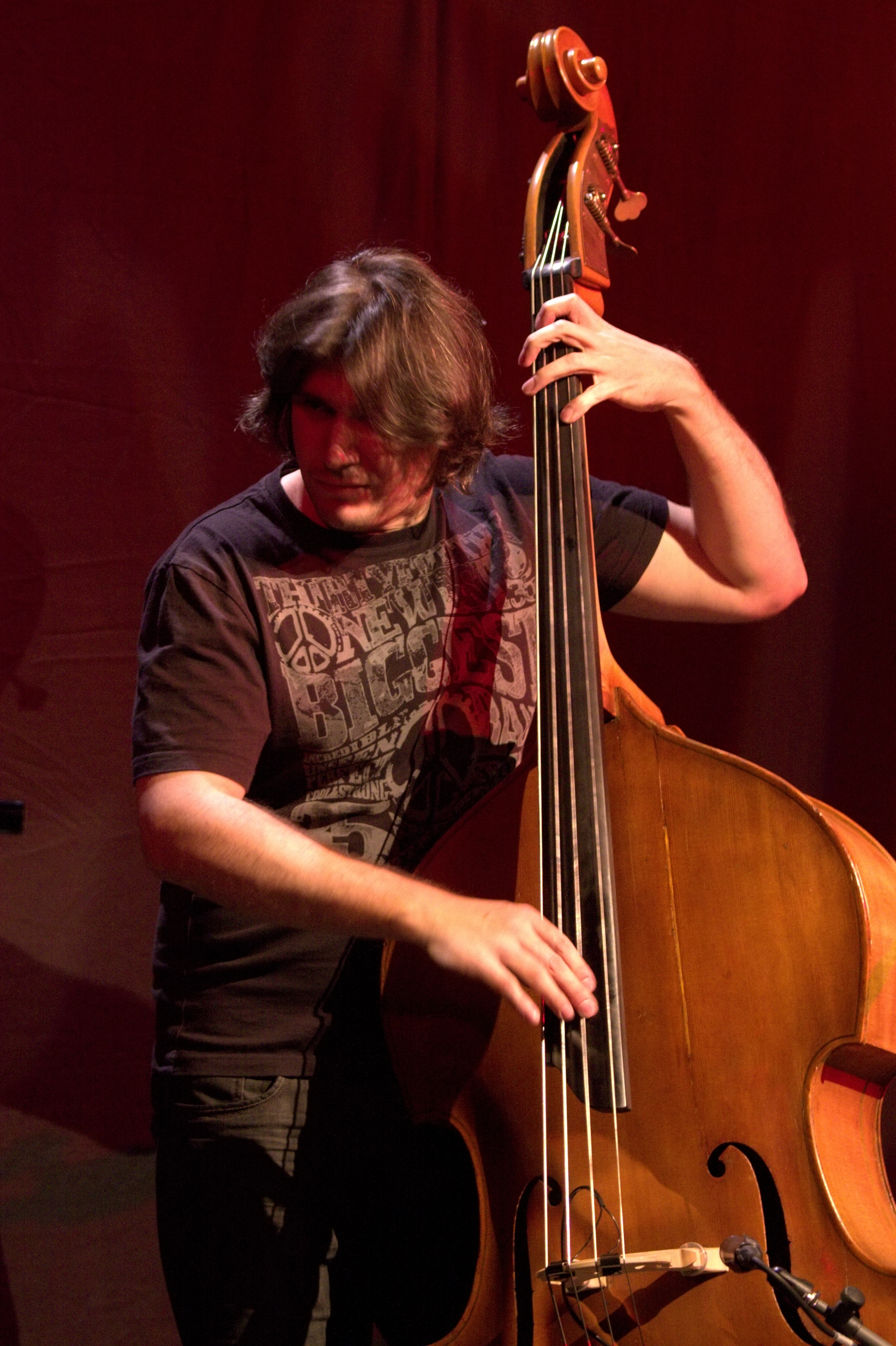 KRAKÓW, POLSKA - 6 GRUDNIA: Sławomir Kurkiewicz (bass) z grupy Marcin Wasilewski Trio podczas ostatniego koncertu IV Krakowskiej Jesieni Jazzowej, który odbył się w Muzeum Sztuki i Techniki Japońskiej Manggha 6 grudnia 2009 w Krakowie, Polska. (foto: Wojciech Migda)